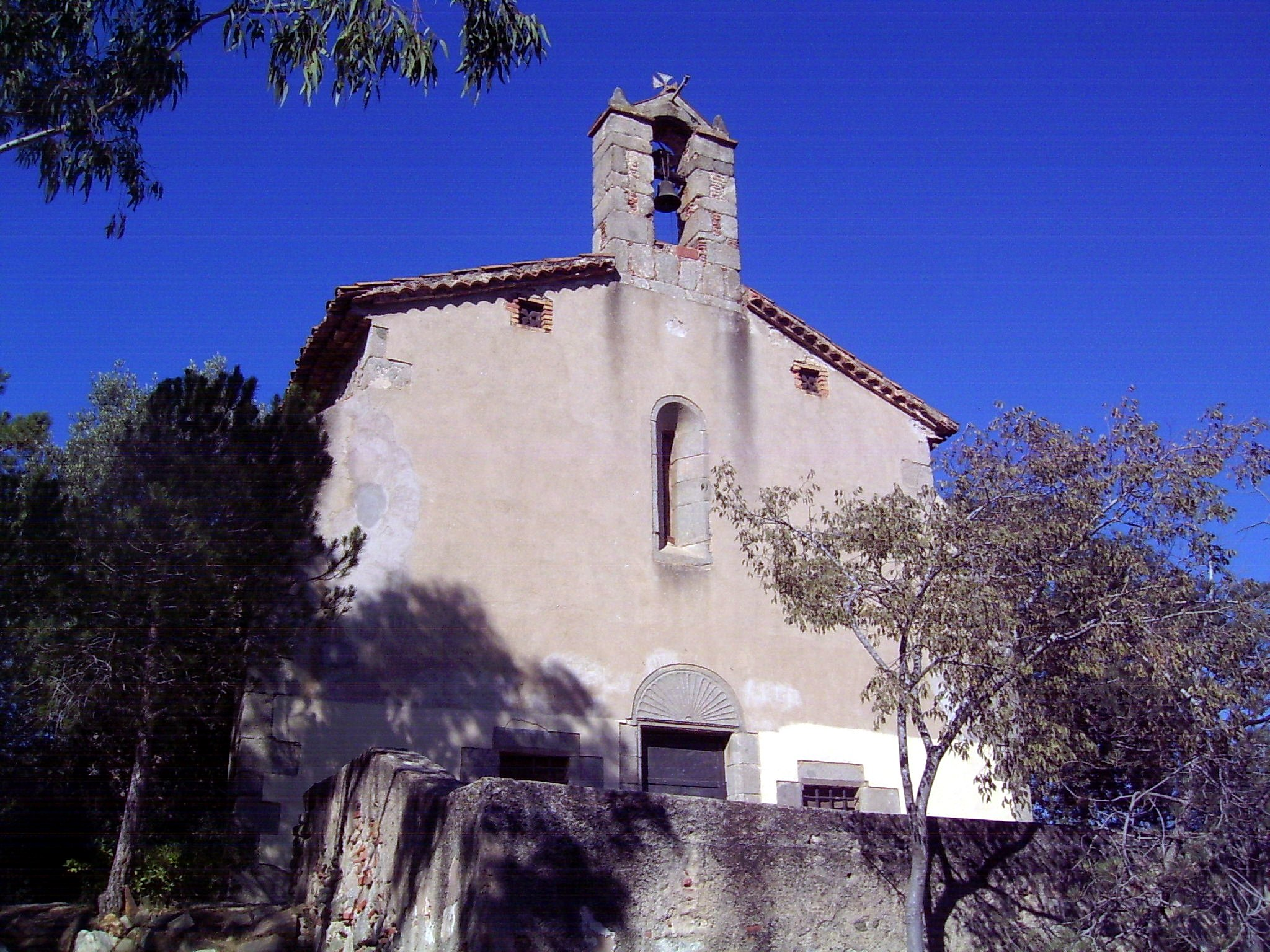 Ermita de sant Sebastià, data del 1570, a Vilassar de Dalt, comarca del Maresme, Catalunya.